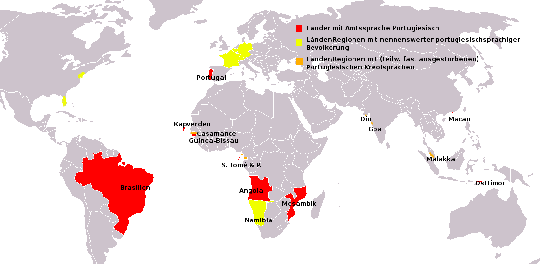 Takad ar portugaleg dre ar bed hiziv.